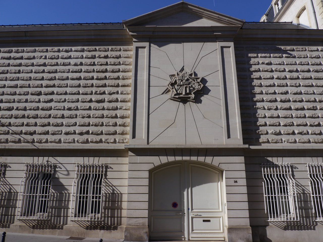 Façade néoclassique (1978) ajoutée à l'ancien Hôtel de la Monnaie de Nancy, Archives départementales de la Meurthe depuis 1795. Le fronton monumental de la porte représente les fortifications de Vauban (Longwy, Toul...) et les blasons évoquent Pont-à-Mousson, Toul, Nancy, Lunéville, le Duché de Lorraine, la Meurthe ainsi que la Moselle.